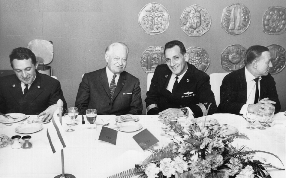 מימין לשמאל: משה קשתי, שלמה אראל, פליקס אמיו, צבי תירוש. Original Image Name:המילוט משרבור, Location:הים התיכון